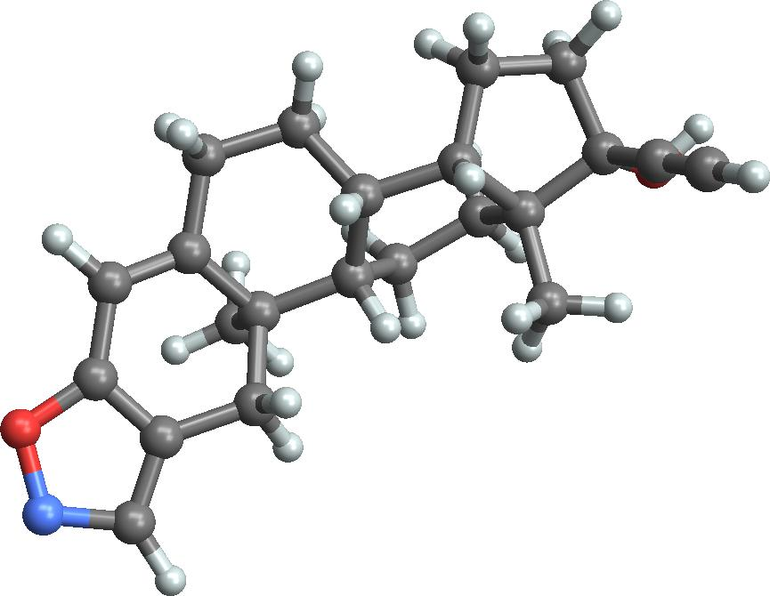 Трехмерная модель молекулы даназола